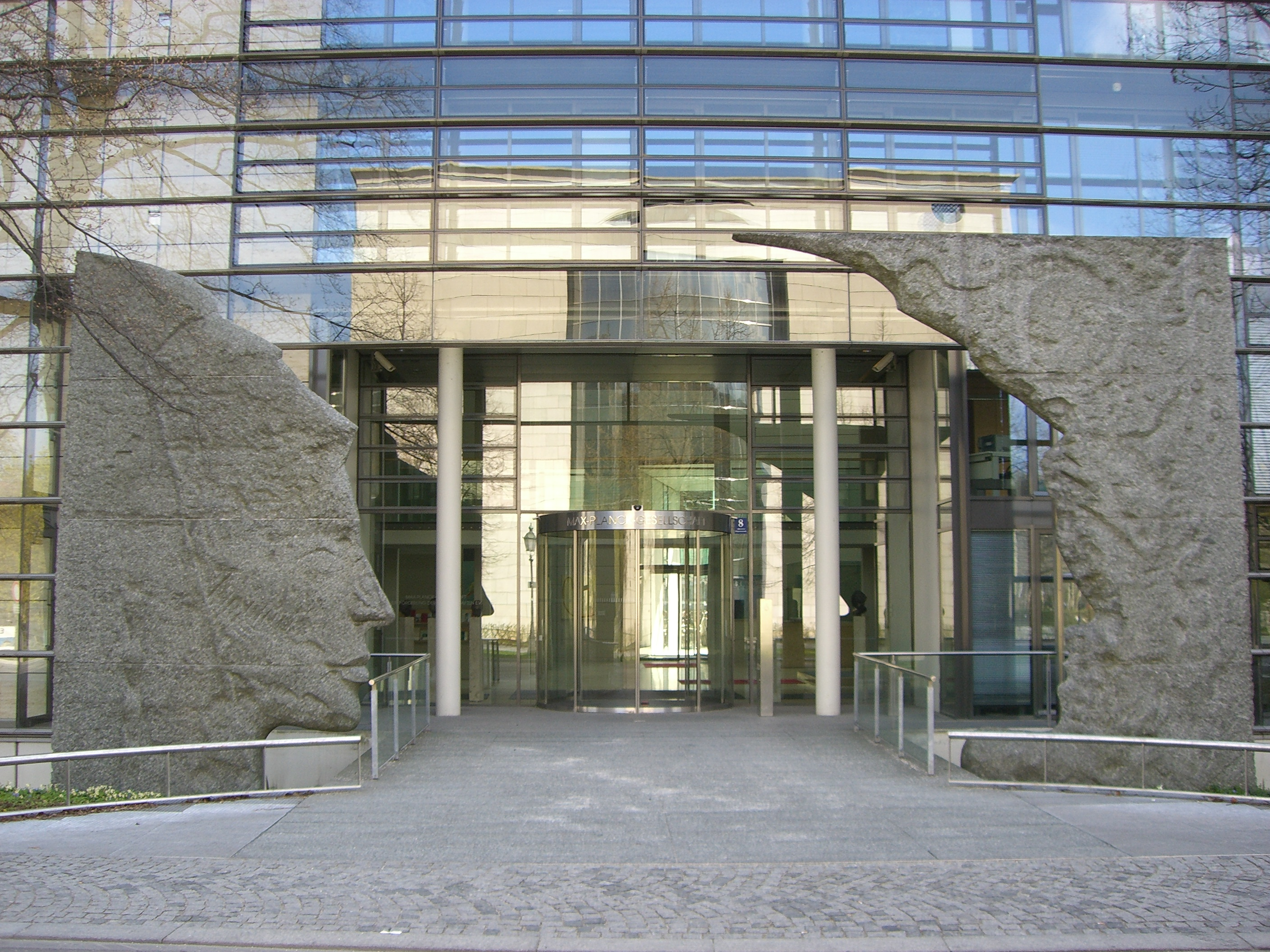 München - Der Eingang zum Hauptsitz der Max-Planck-Gesellschaft